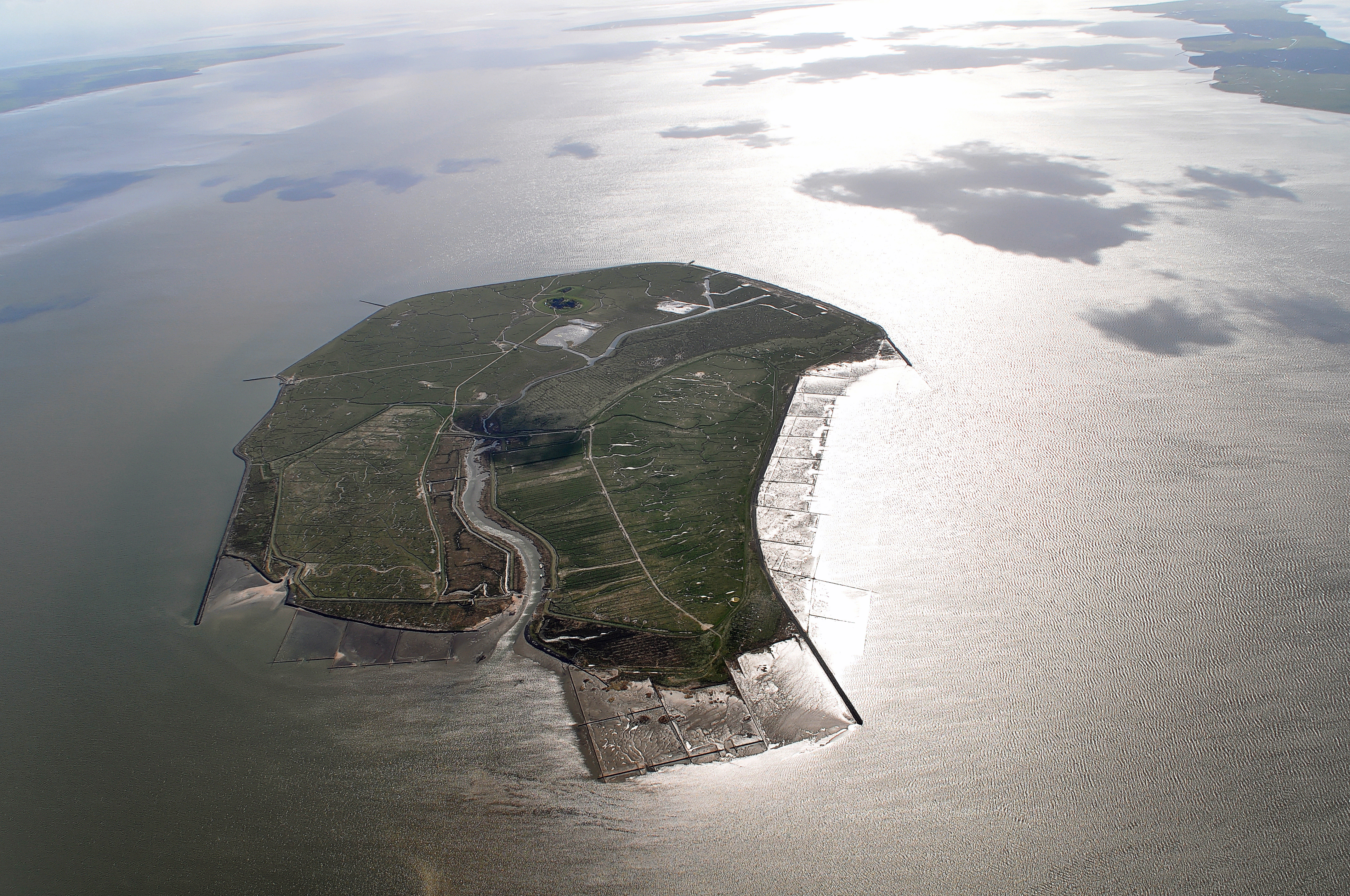 Luftbilder von der Nordseeküste 2012-05 Hallig Gröde von Osten